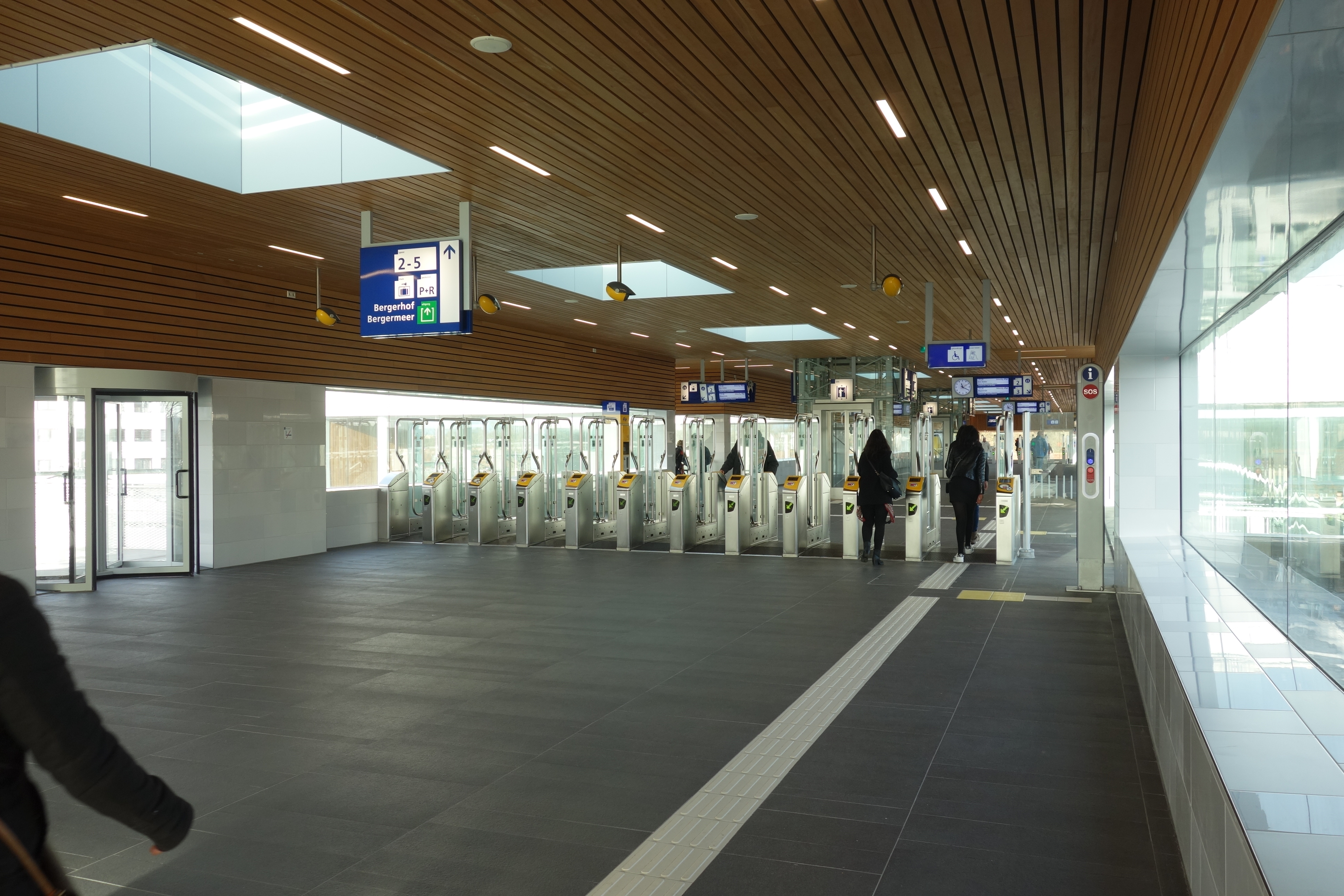 Poortjes in de hal boven de sporen van station Alkmaar